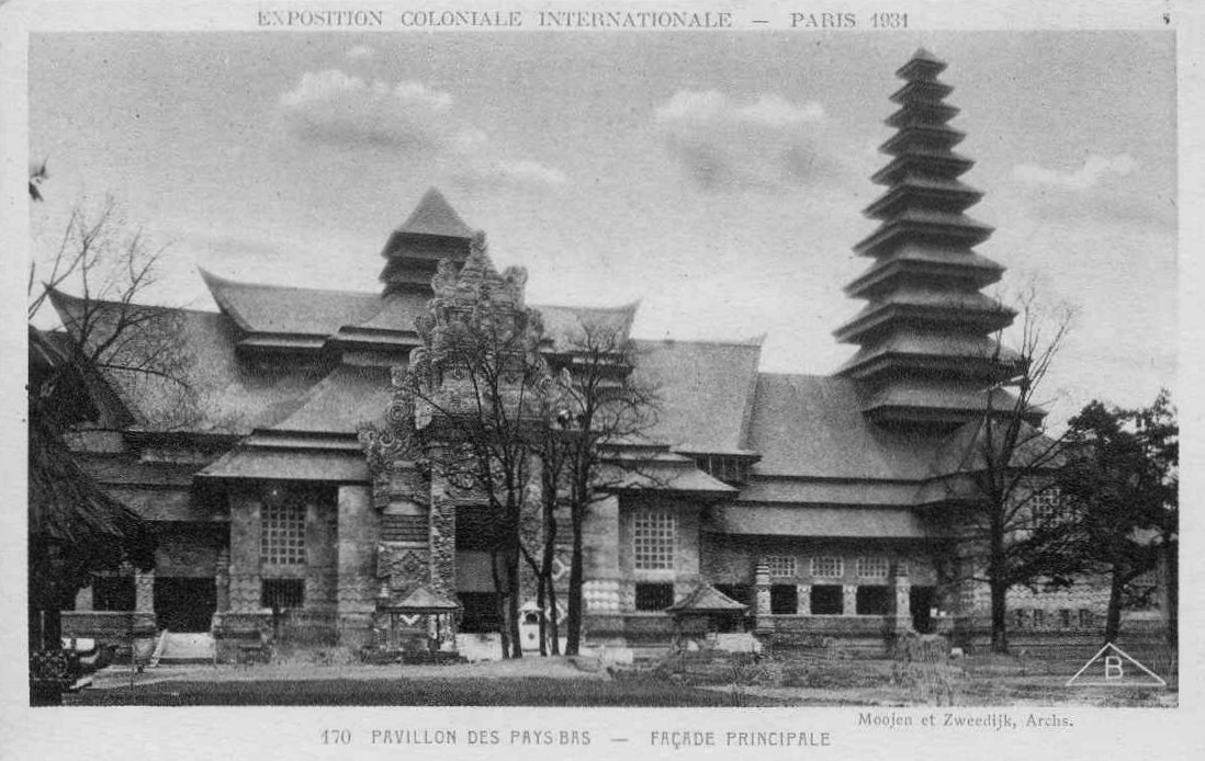 Pavillon des Pays-Bas à l'Exposition Coloniale de PARIS en 1931